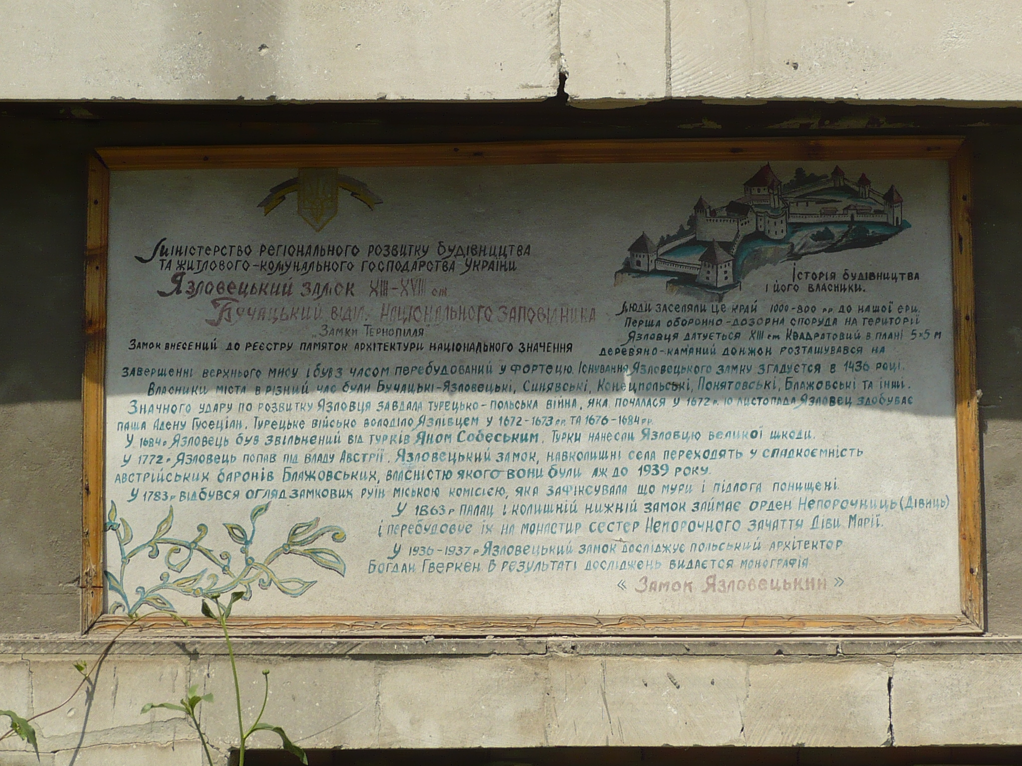 Jazłowiec. Zamek